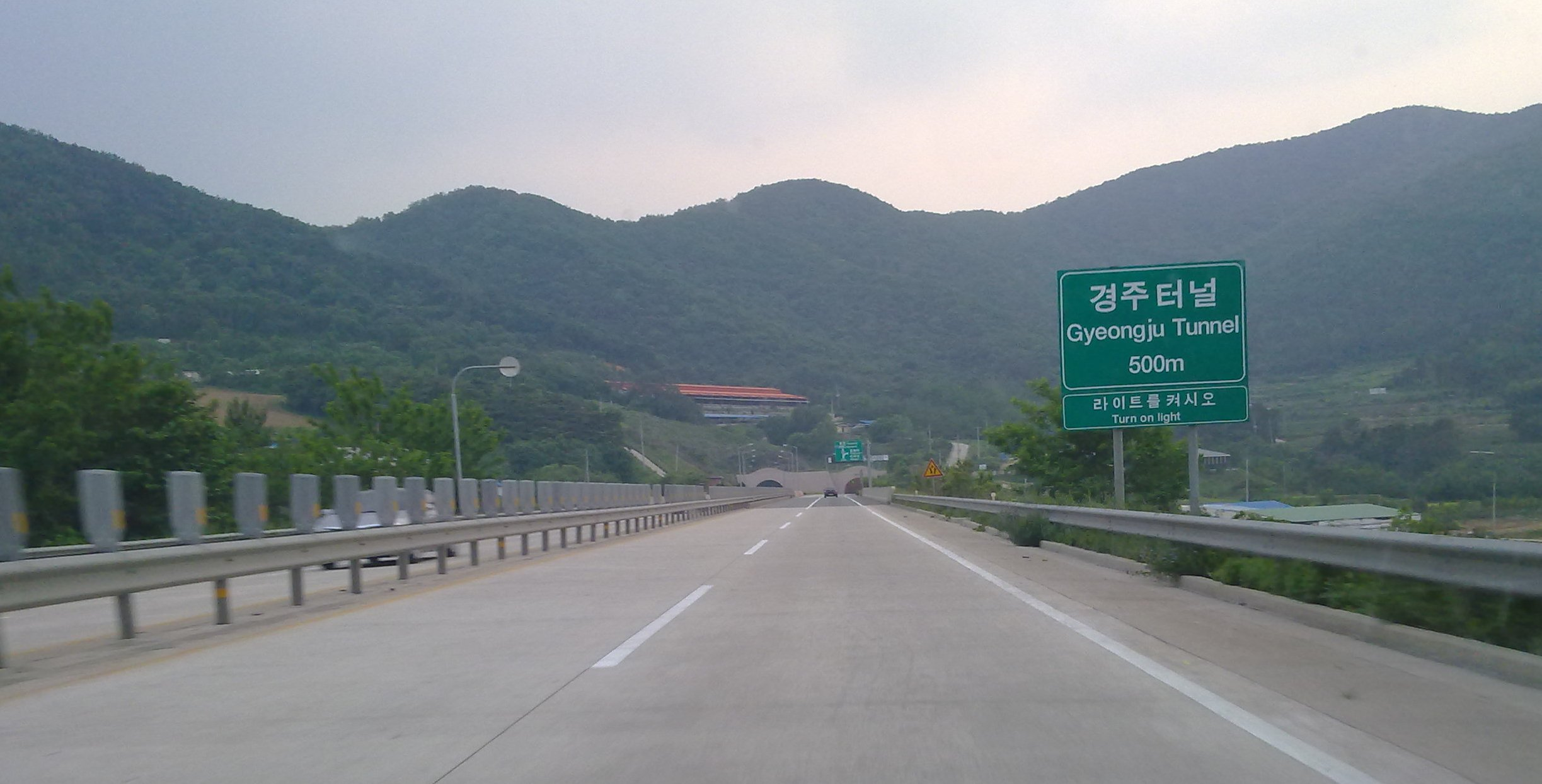 국도 20호선 경주터널(건천방향)